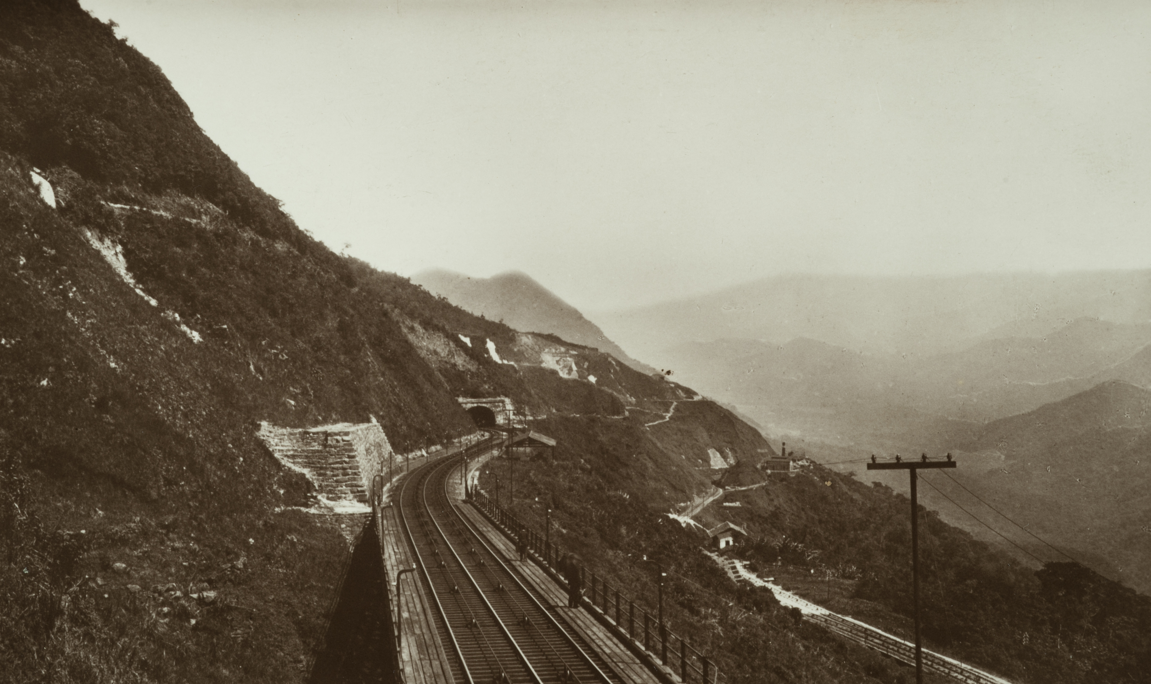 Obra que integra o acervo do Museu Paulista da USP.